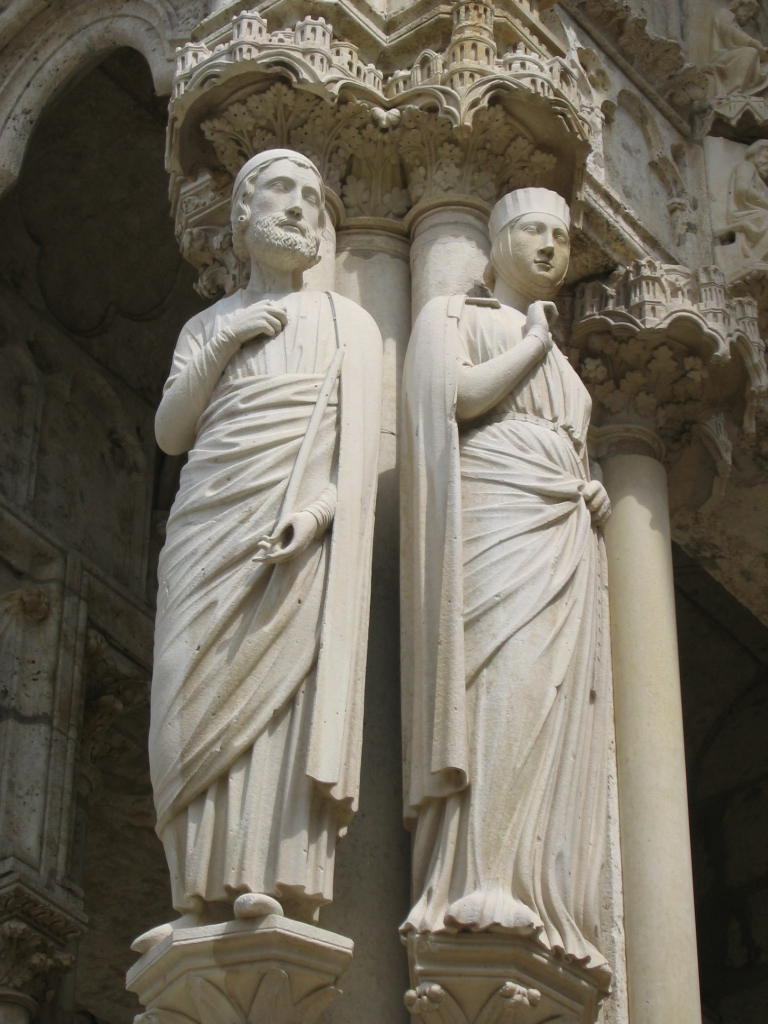 Porche Nord, portail central de la cathédrale de Chartres, statues de gauche